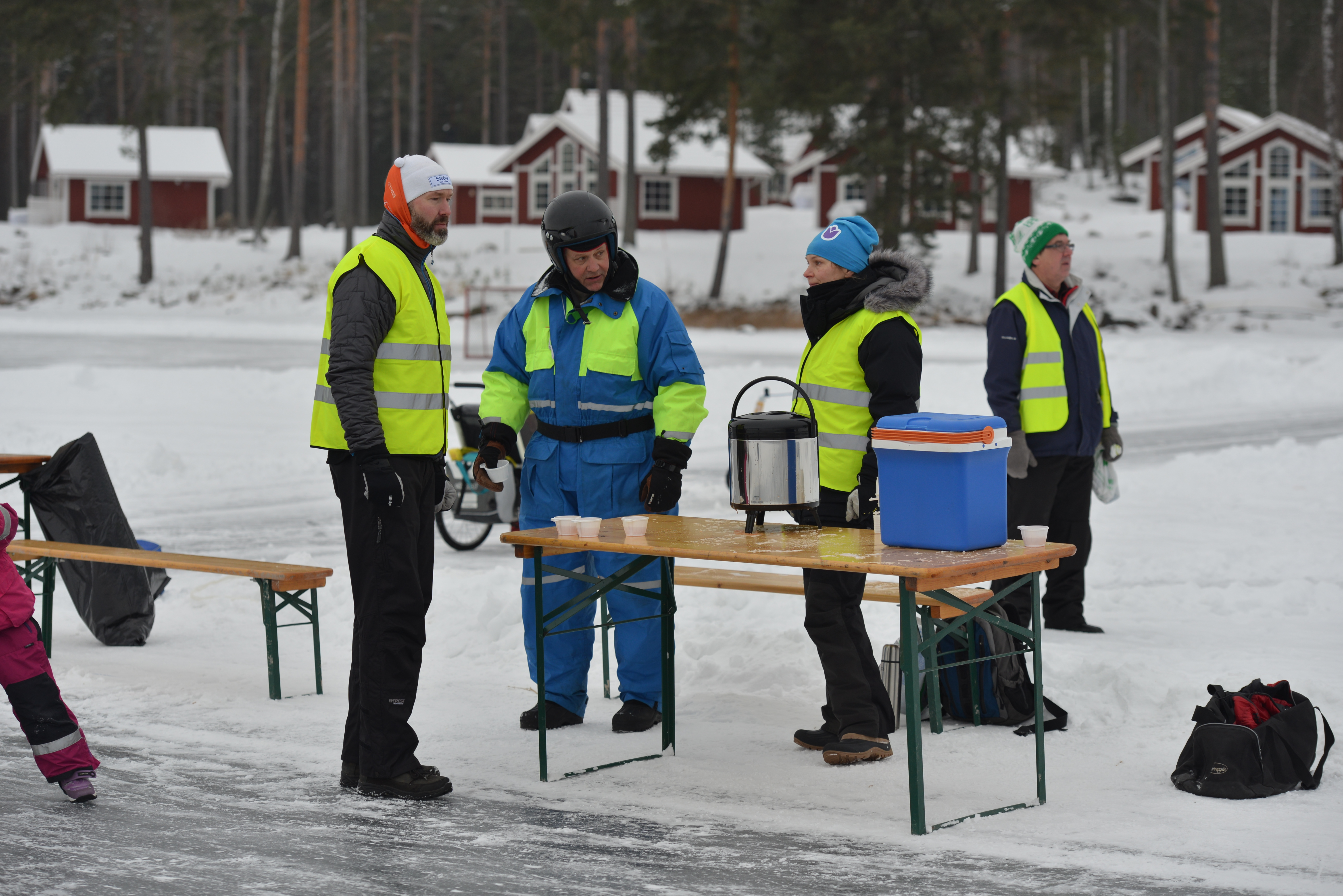 SM i hastighetsåkning på skridskor, maraton, sex varv runt en bana på sjön Runn. Peter Resar vann herrklassen före Matt X. Richardson och David Hjalmarsson. Eva Lagrange vann damklassen före Anna Hånell och Lina Börjes. Dryck-funktionärer nära start/mål.